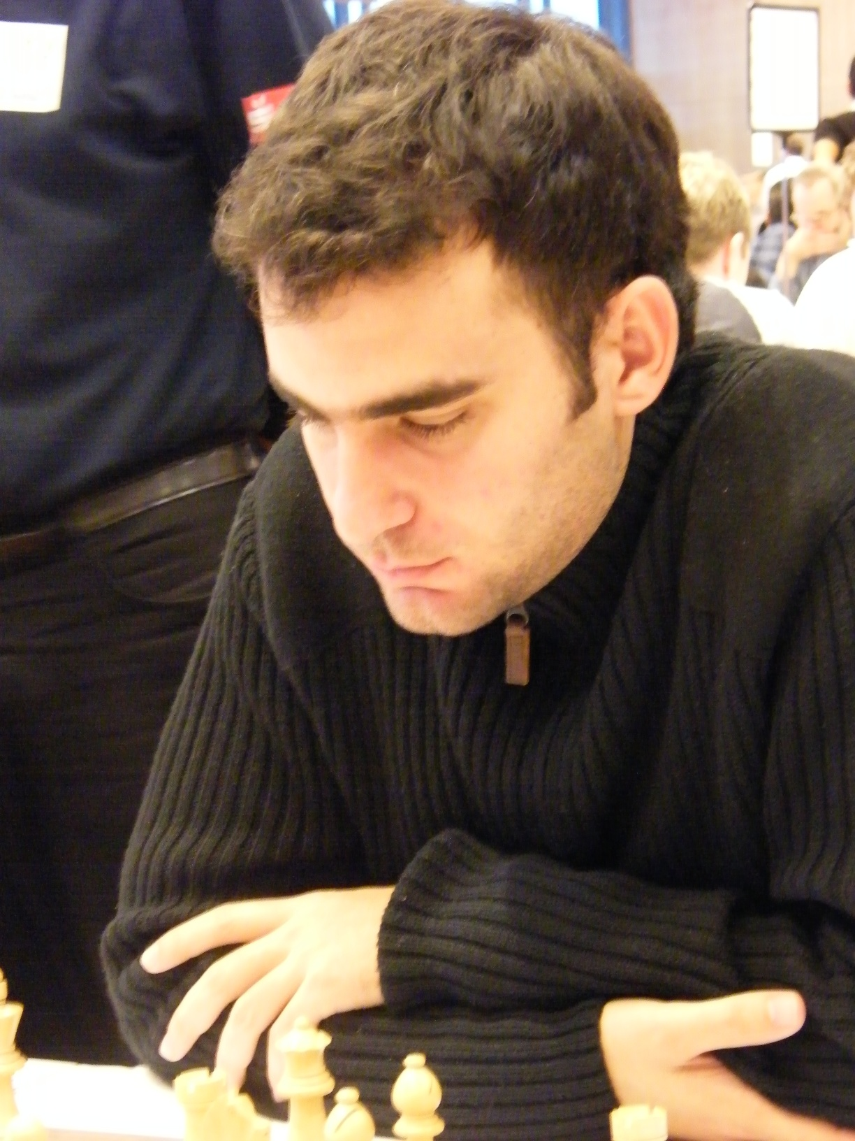 Leinier Dominguez Perez bei der 38. Schacholympiade in Dresden 2008